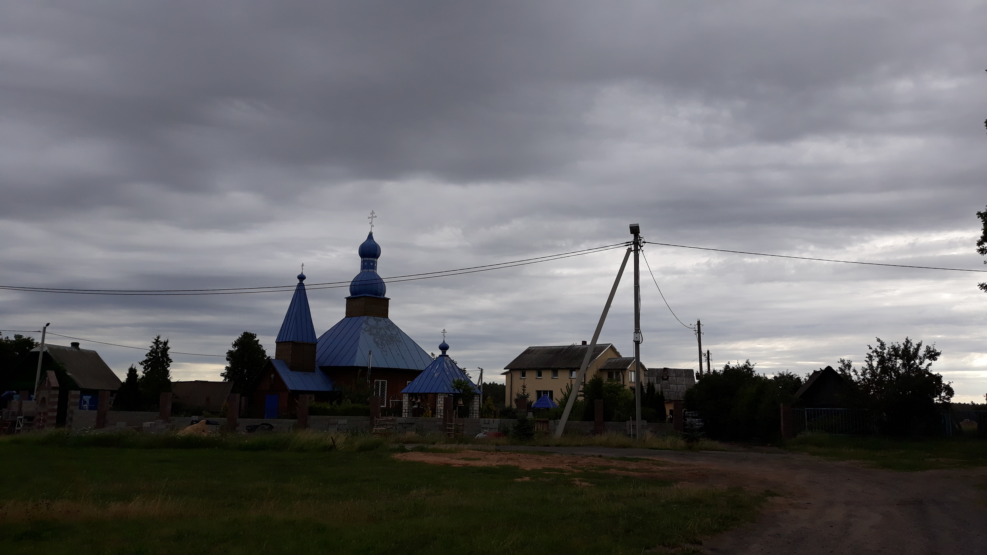 Успенскі манастыр